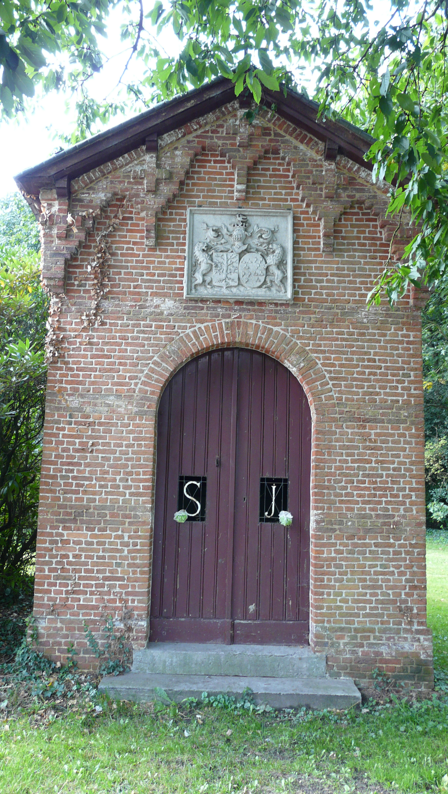 Sint-Jozefkapel, Bouwel (Grobbendonk), Herenthoutsesteenweg (hoek met Molendreef)